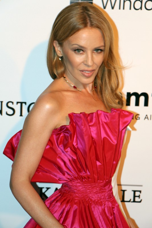 15 - Kylie Minogue-001